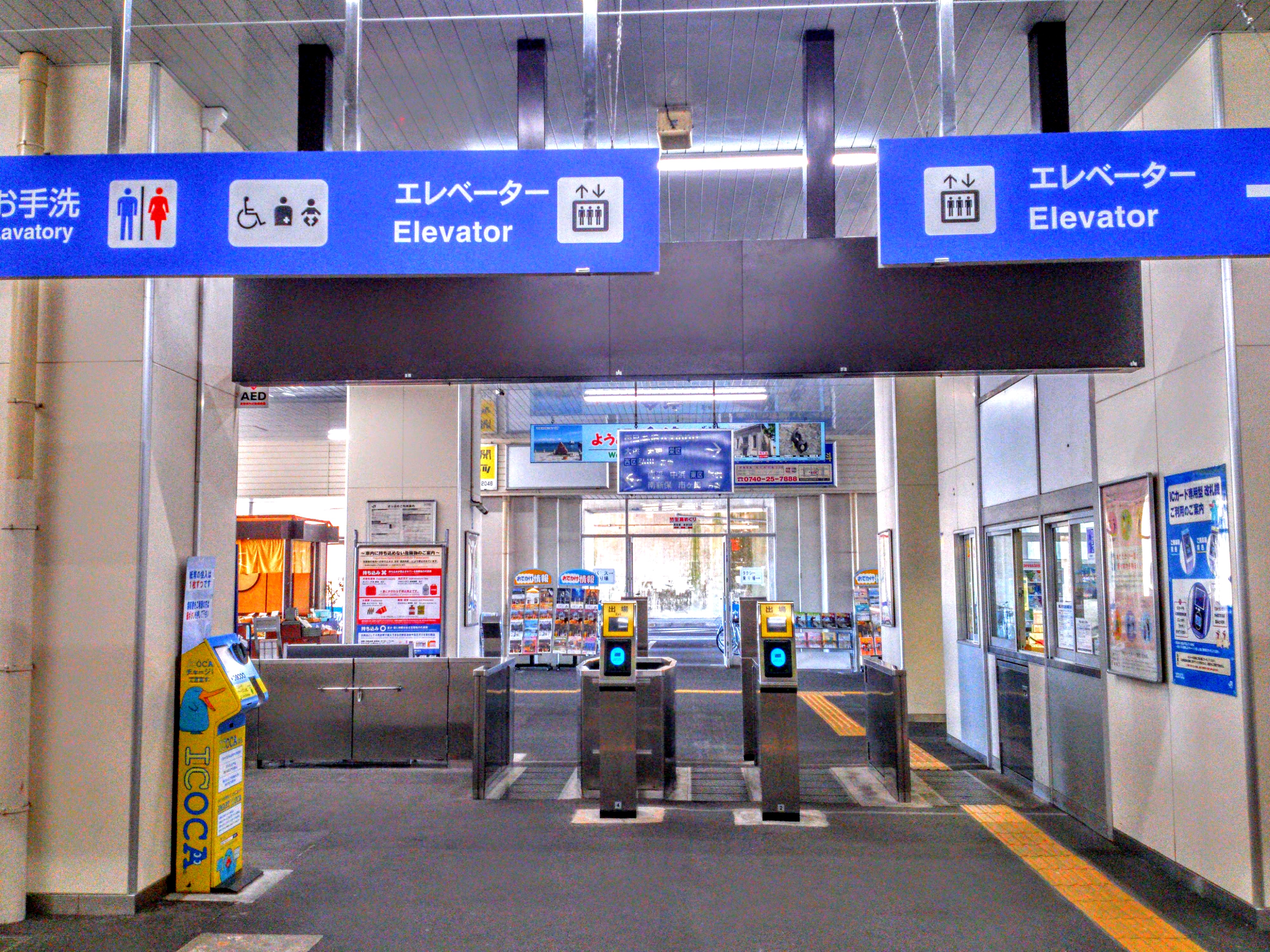 近江今津駅の改札口